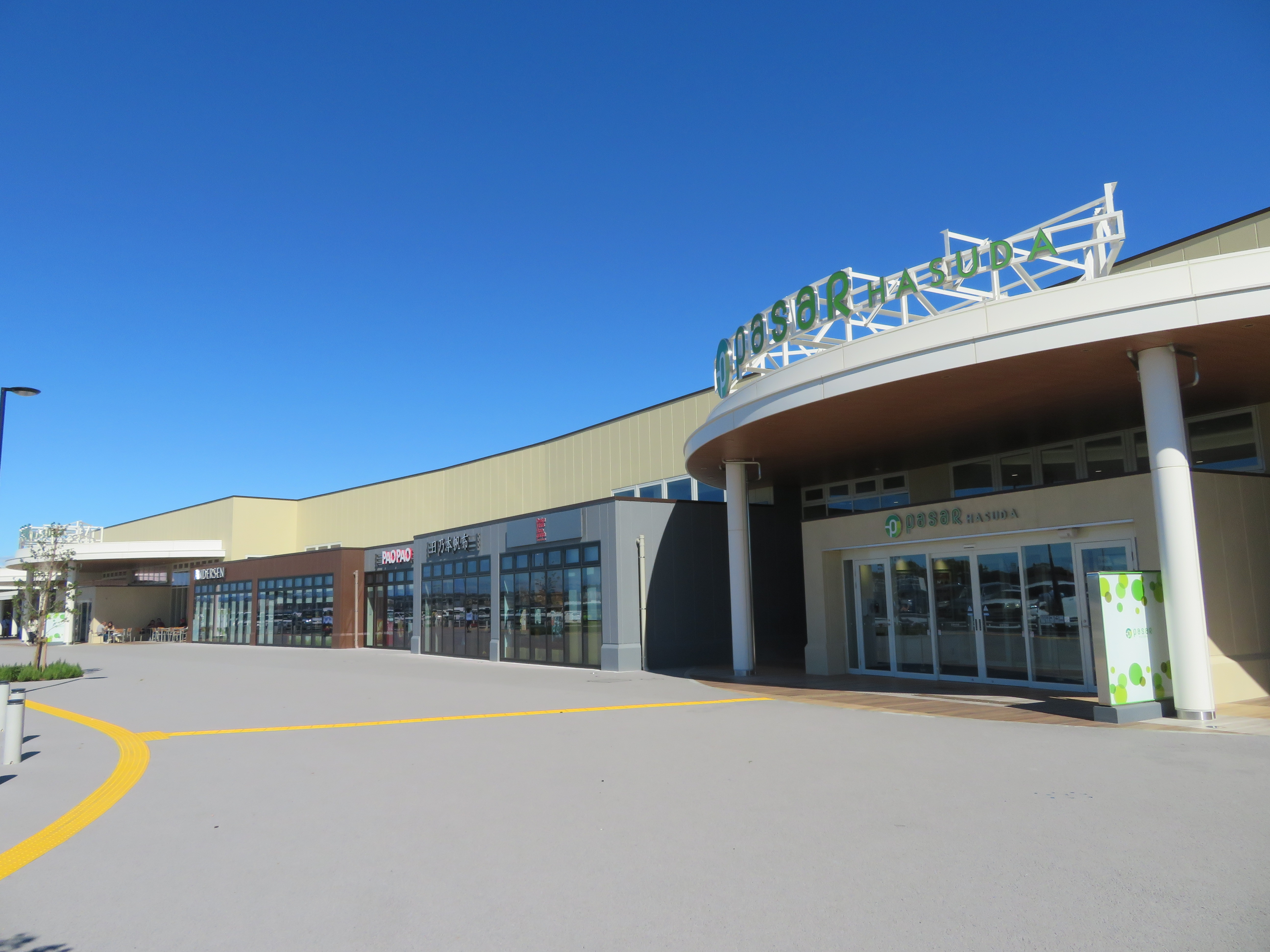 東北自動車道蓮田サービスエリア上り線施設（パサール蓮田）